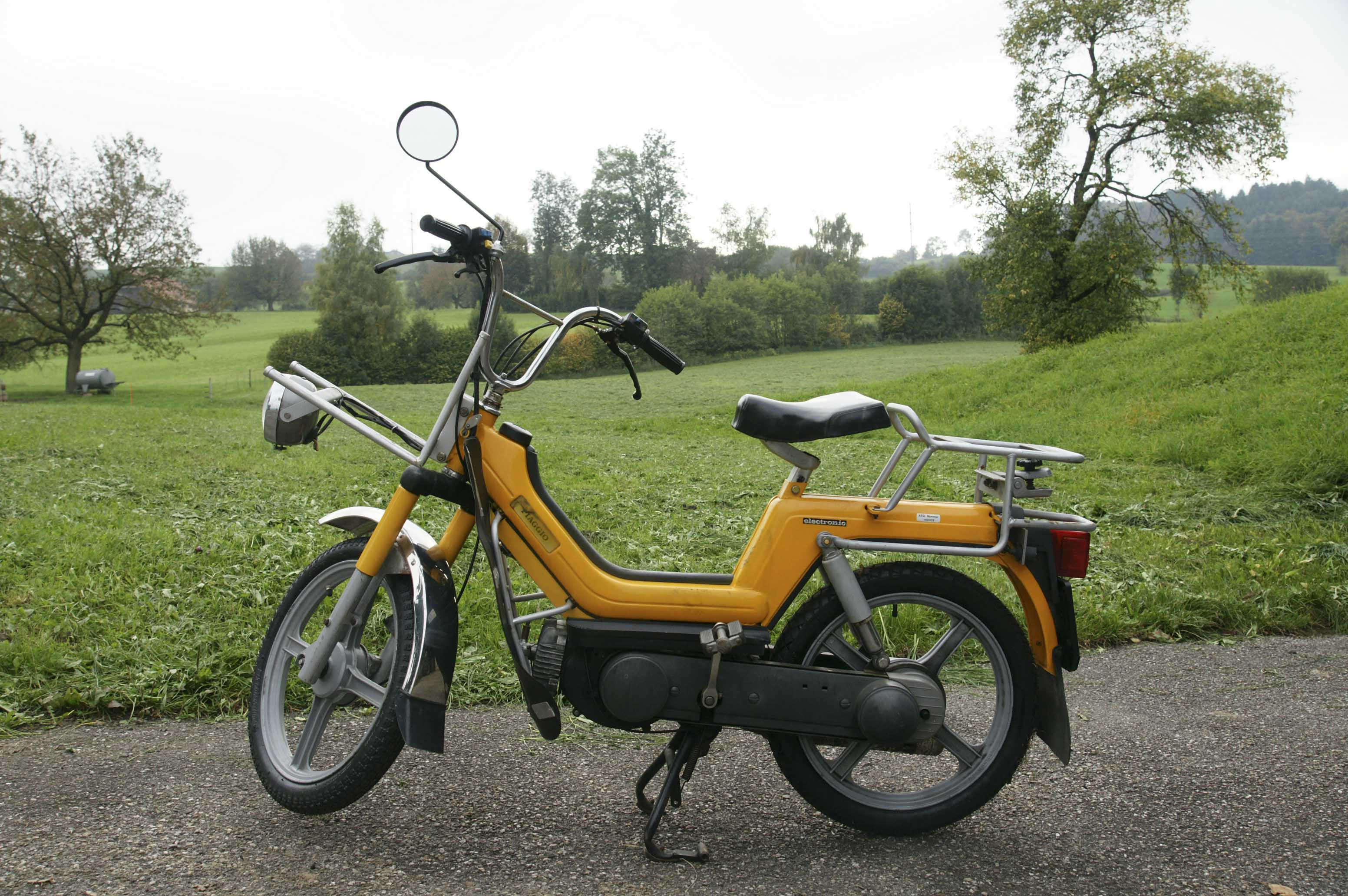 Piaggio Mofa der Schweizer Post